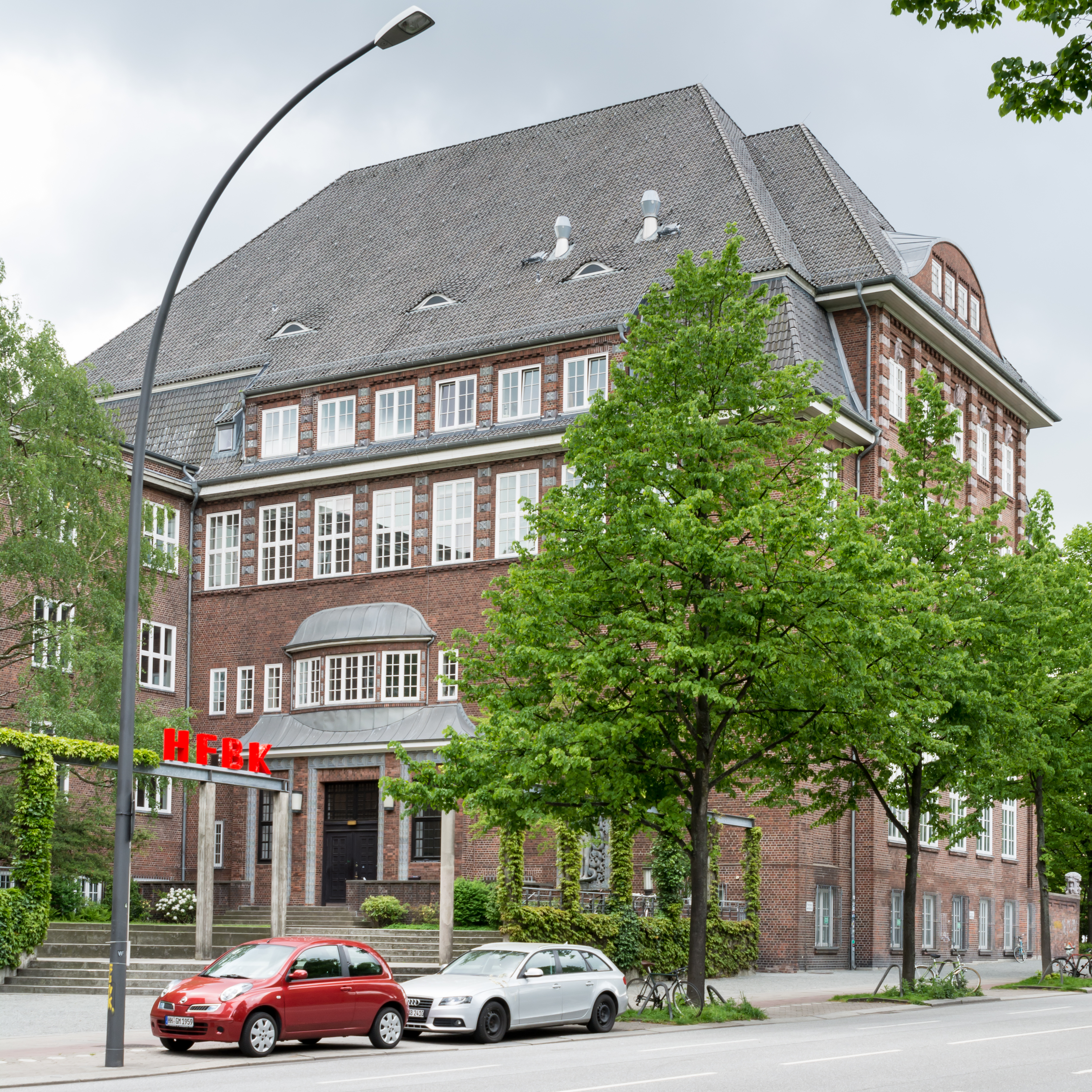 Südflügel der Hochschule für Bildende Künste in Hamburg-Uhlenhorst. This is a photograph of an architectural monument.